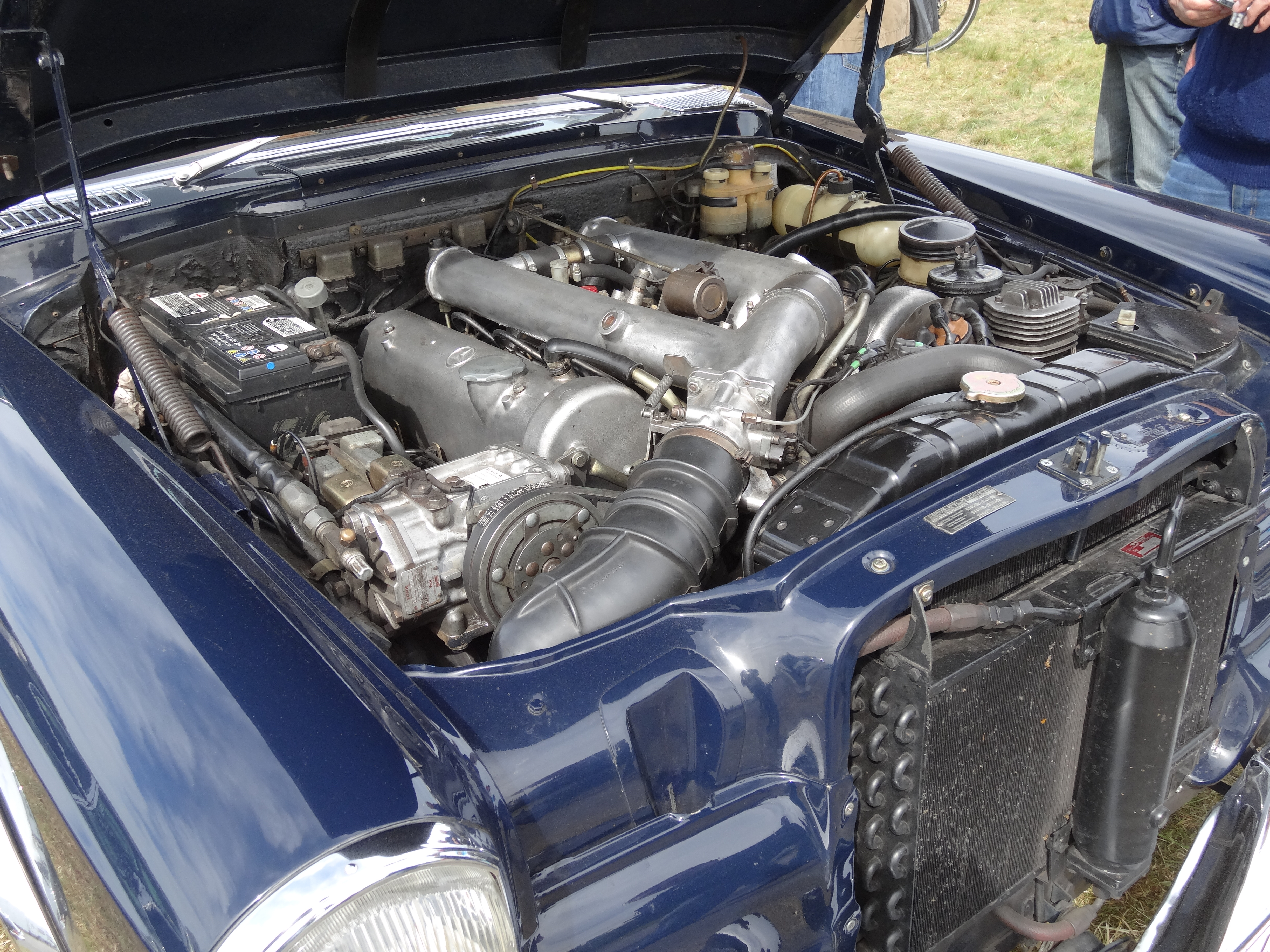 Impressionen vom ersten Classic Motor Day auf dem ehemaligen Flugplatz Hungriger Wolf in Hohenlockstedt.